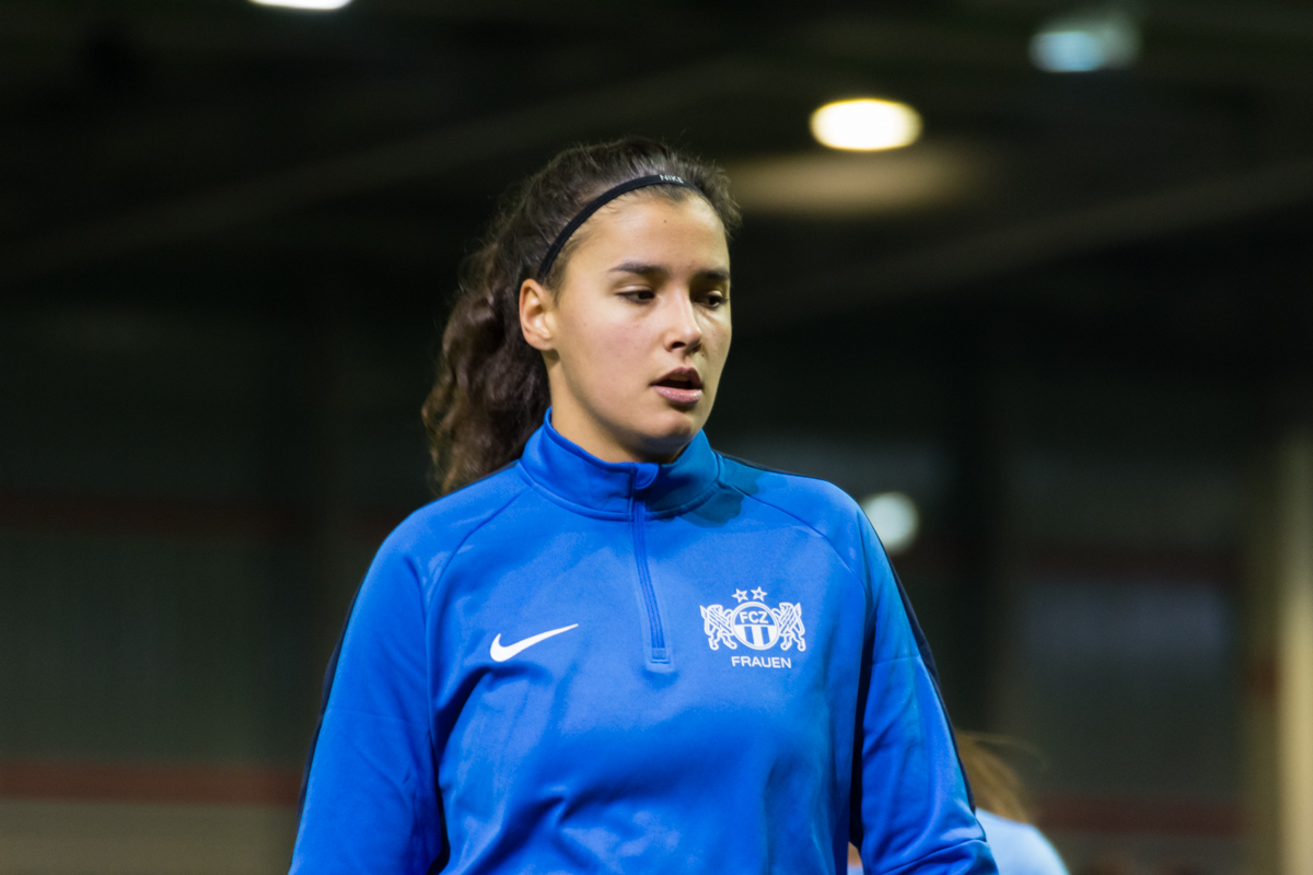 Cinzia Zehnder warming up before the match vs FC Bayern München